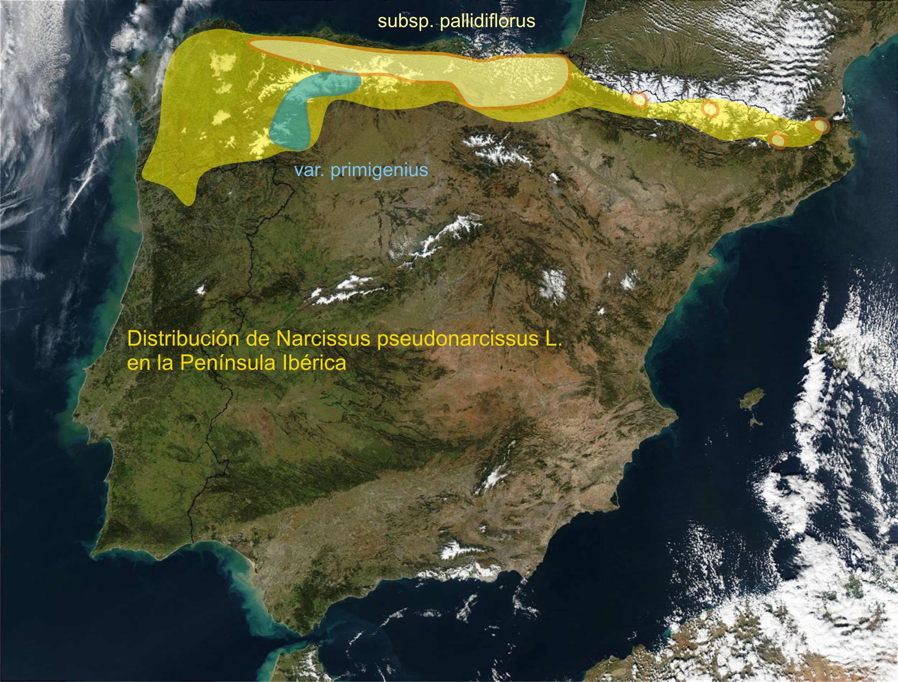 Área de distribución de Narcissus pseudonarcissus L. en la Península Ibérica (incluidos N. leonensis, N. pallidiflorus y N. primigenius).